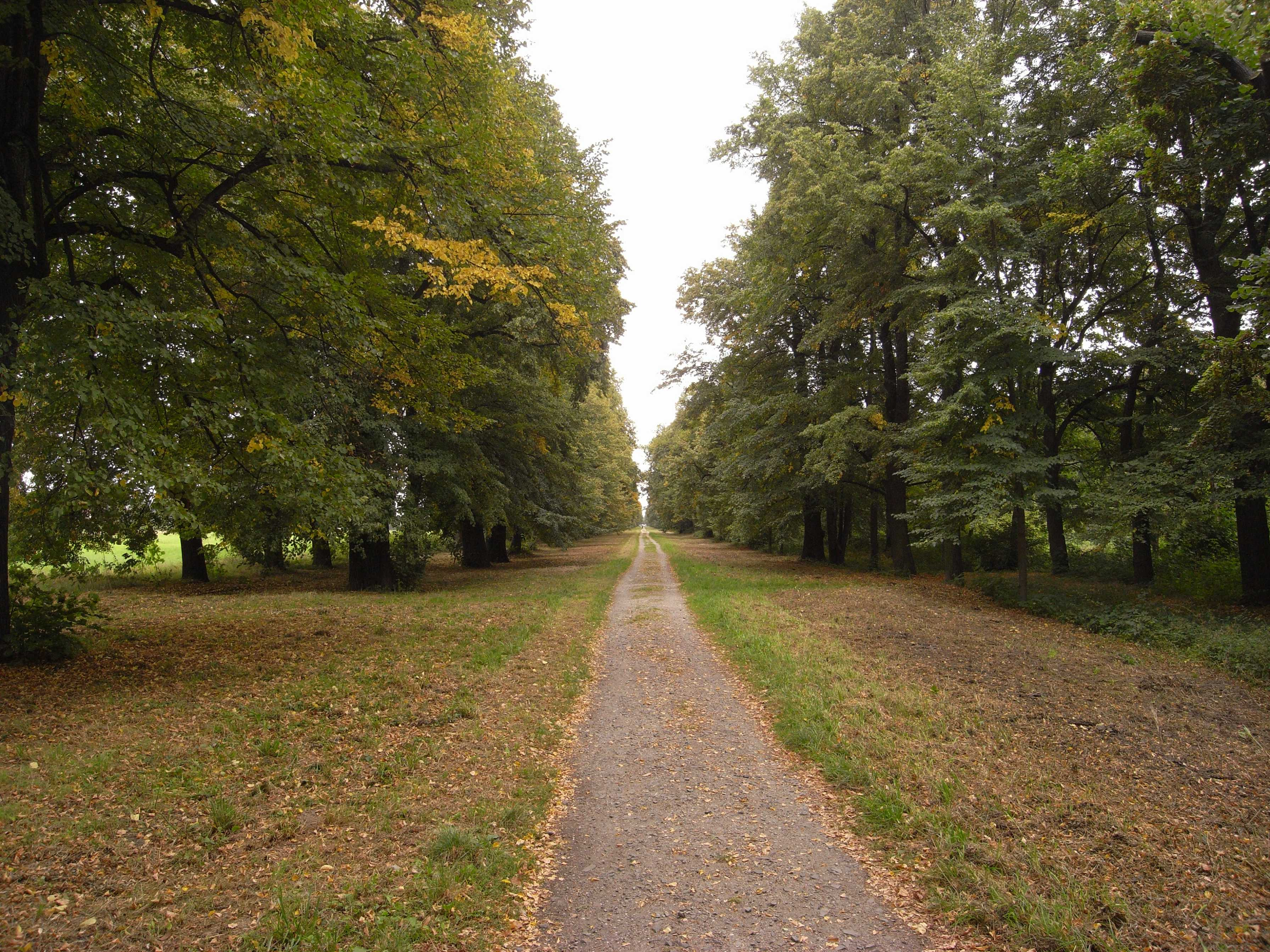 Ostragehege, Pieschener Allee (Dresden, Sachsen, Deutschland)